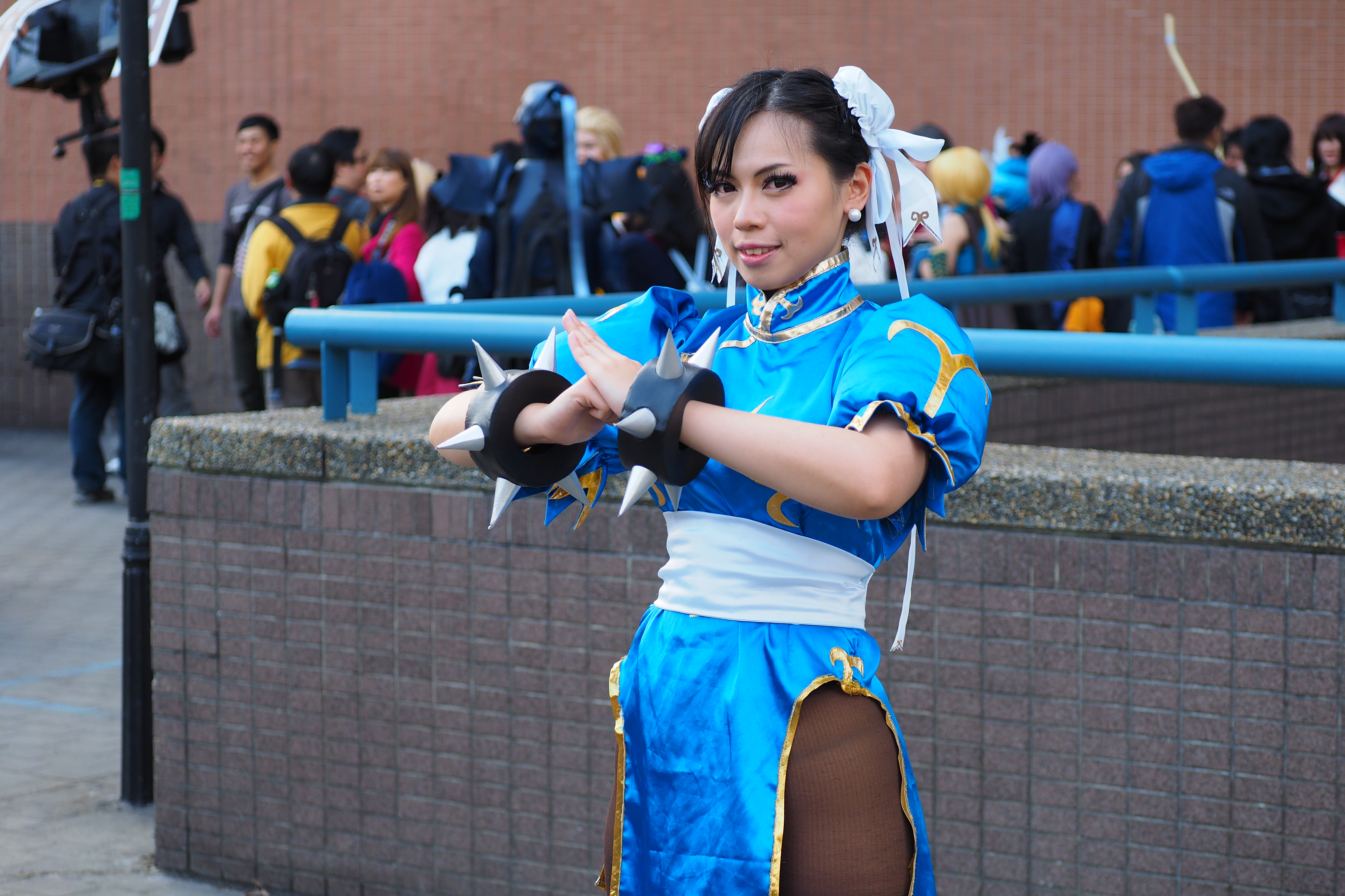 第23屆開拓動漫祭，《Street Fighter系列》春麗cosplayer。